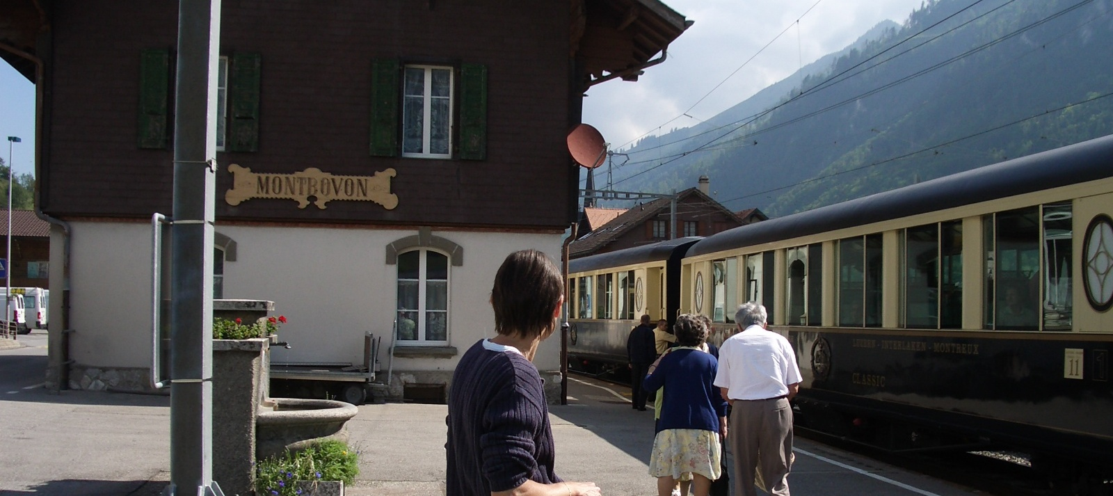 Montbovon, Switzerland self-made, August 2005